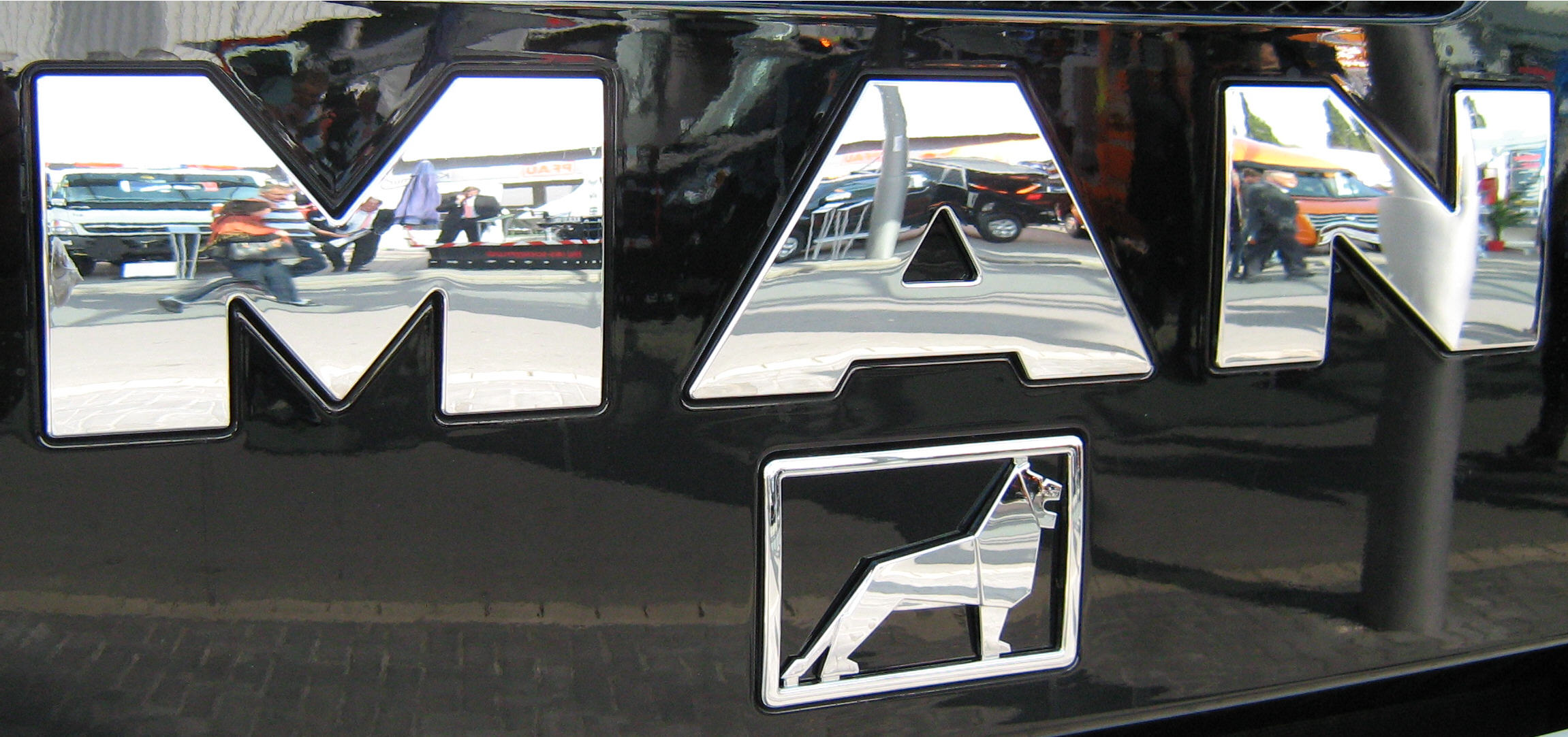 MAN-LKW Frontbeschriftung